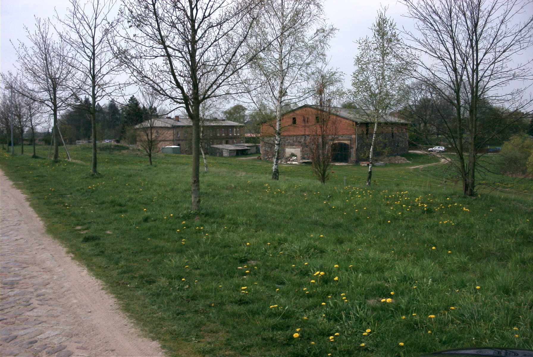 Stallscheune Menzlin